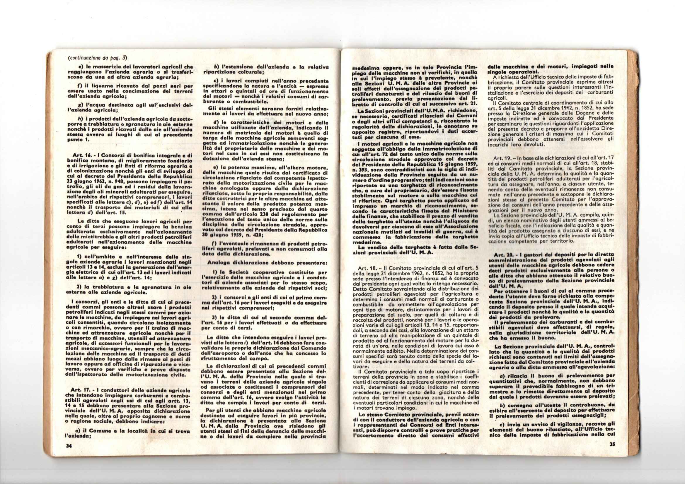 regolamento uma 2